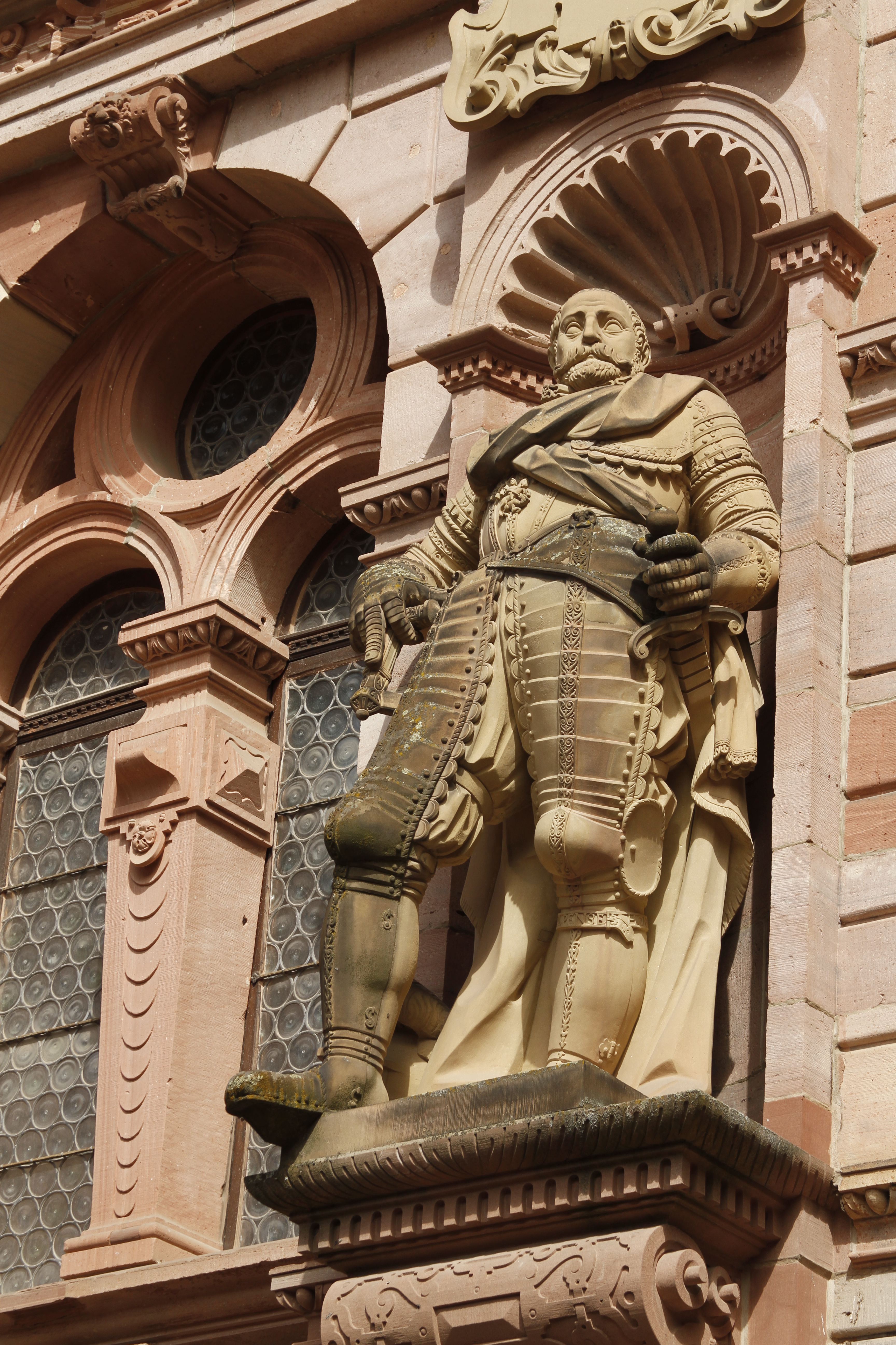 Heidelberg Castle - Heidelberg - Germany